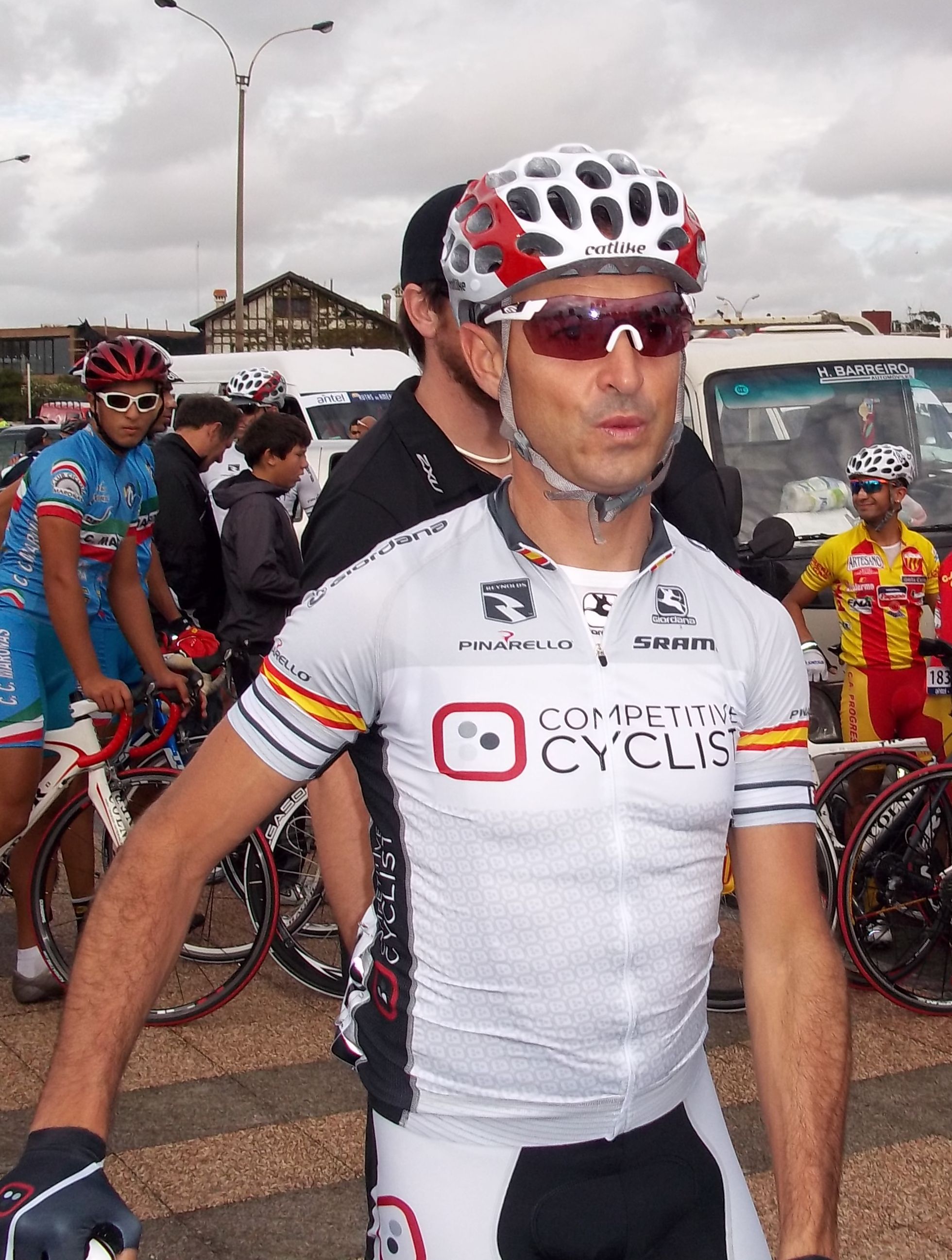 Inicio de Rutas de América 2012. Francisco Mancebo con el maillot del Competitive Cyclist